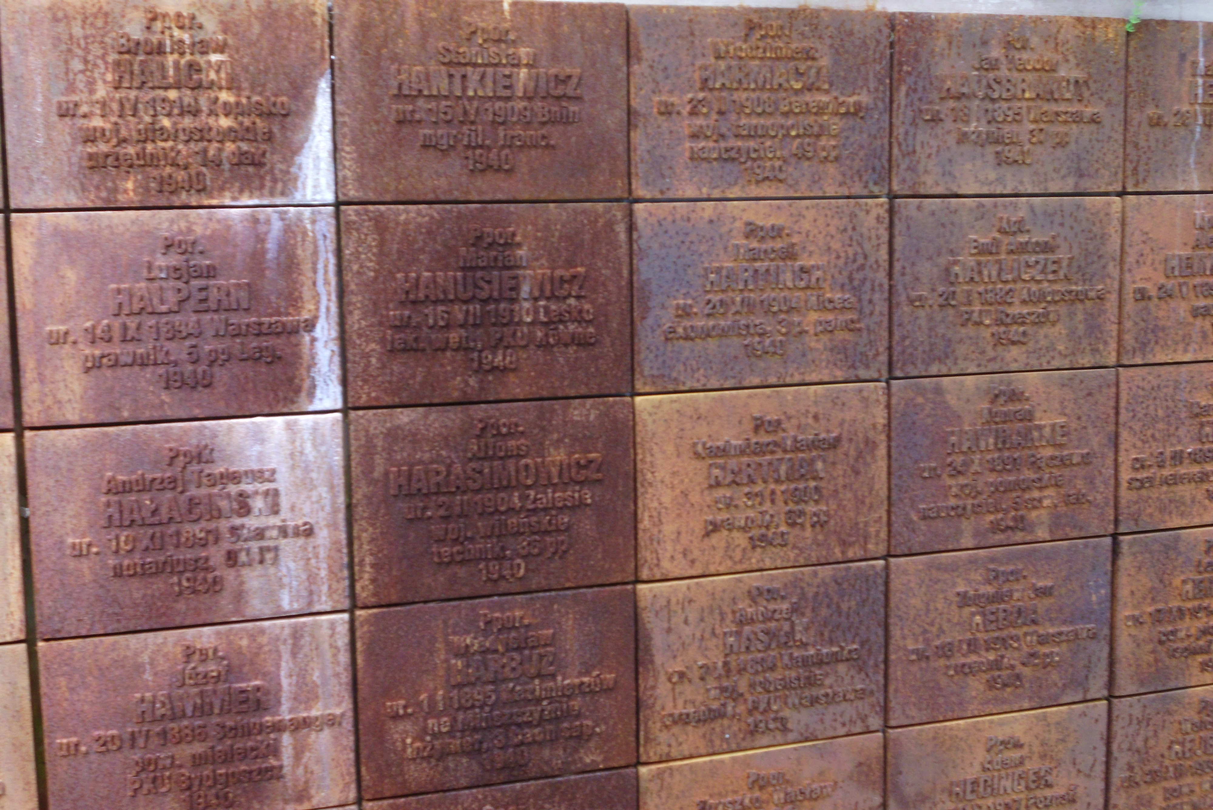 Kwiecień 2013